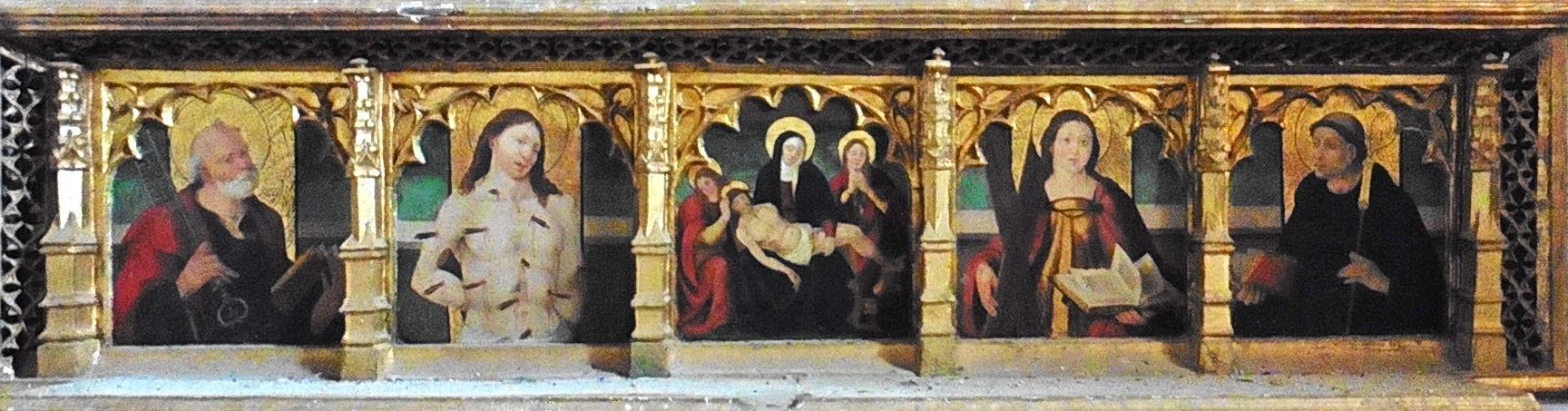 Predel·la del retaule de Nostra-Senyora-de-Las-Grades de Marcevol, Vinça, França. És una obra de Jaume Forner.